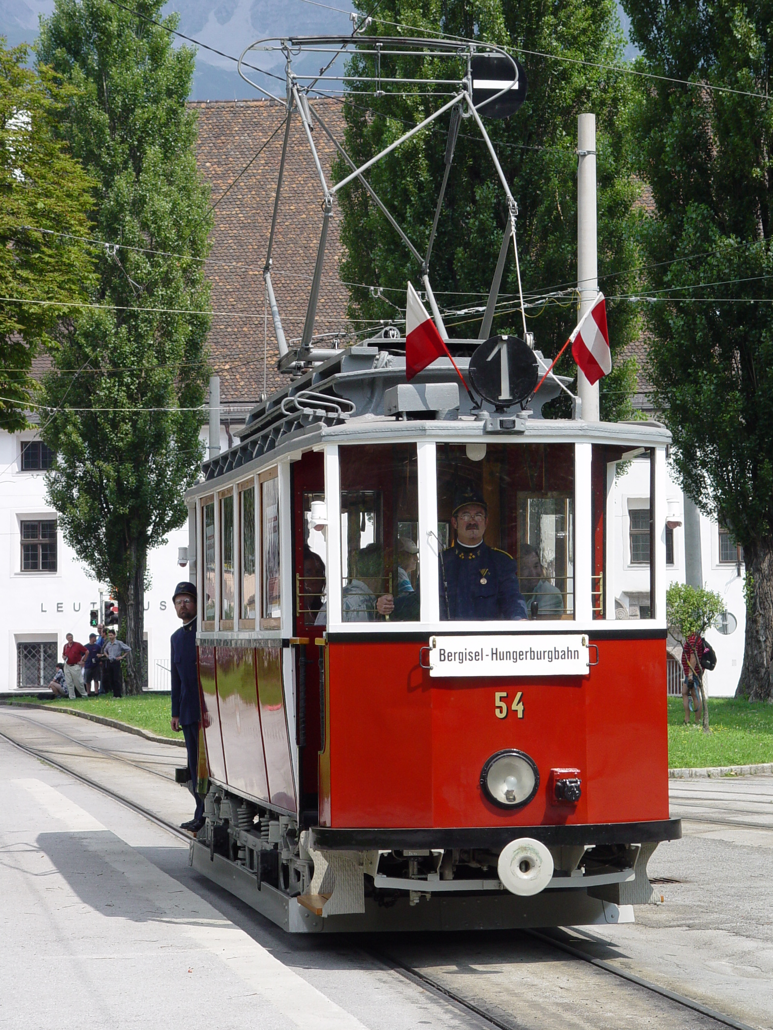 Triebwagen 54 der Tiroler Museumsbahnen am Bergiselbahnhof. Das Personal trägt die Uniformen wie sie um 1900 üblich waren.